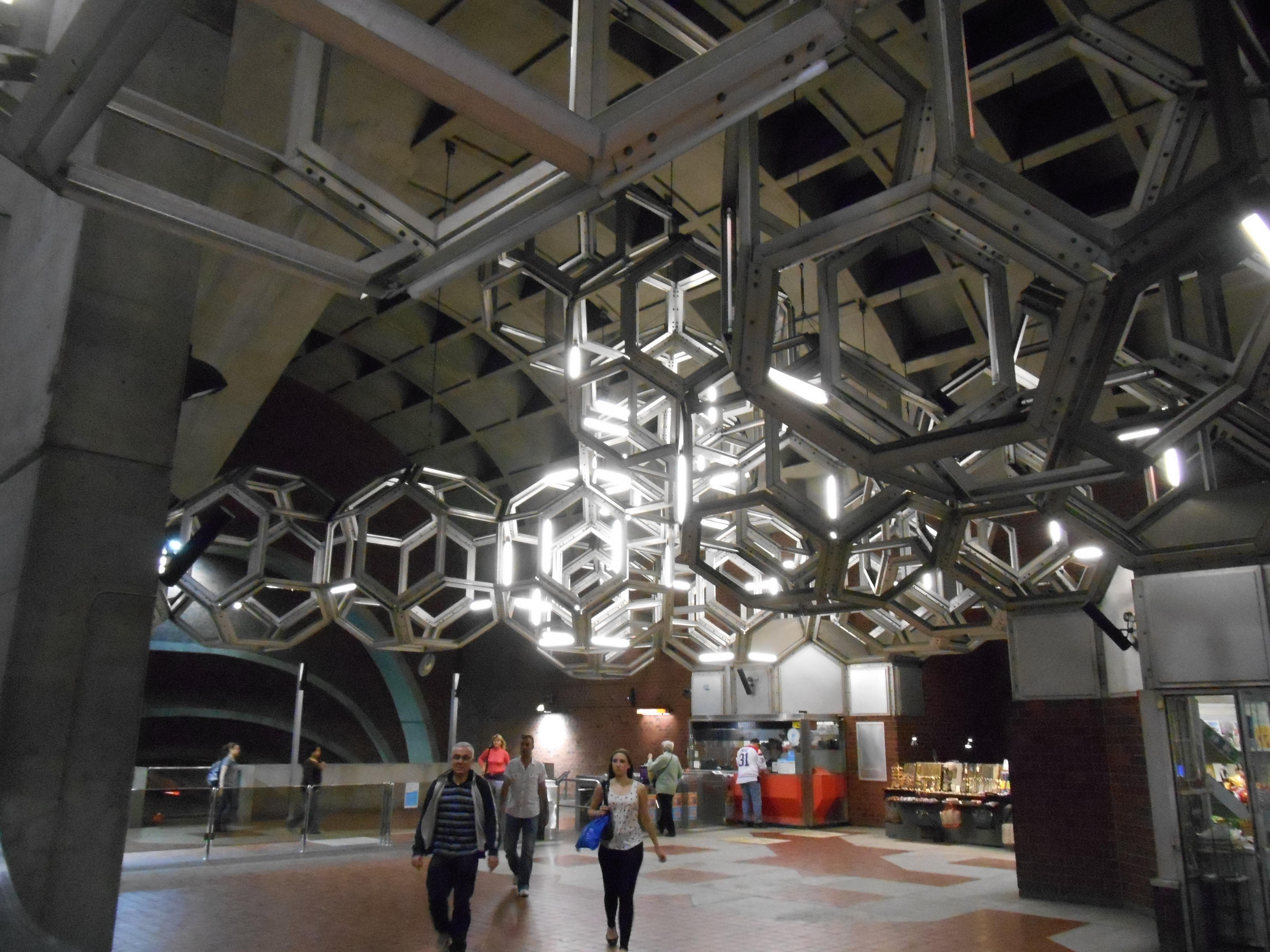 Station de métro Namur, Montréal